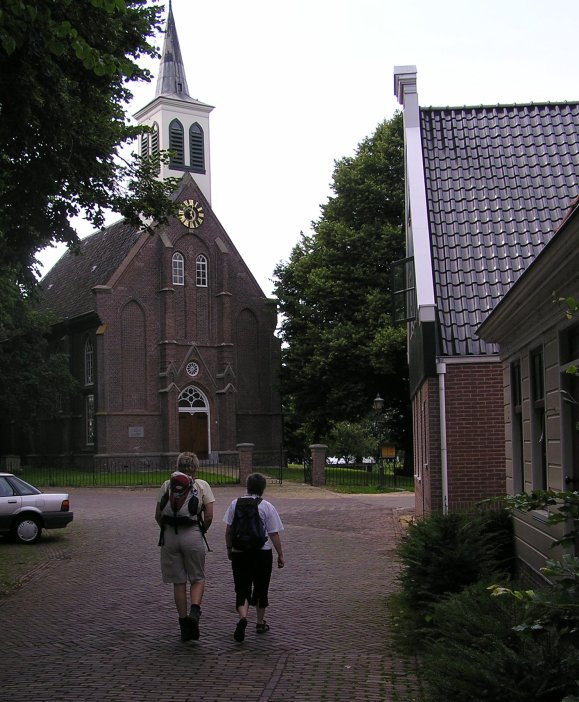 Zuiderwoude, gezicht op de kerk. Eigen foto, juli 2005.